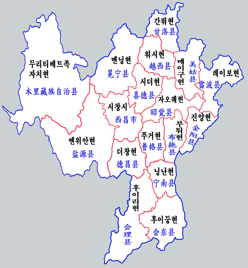 량산이족자치주 현급구역도